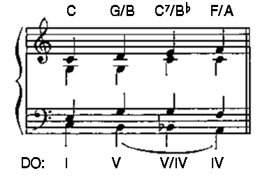 Armonía usando una alteración cromática descendente